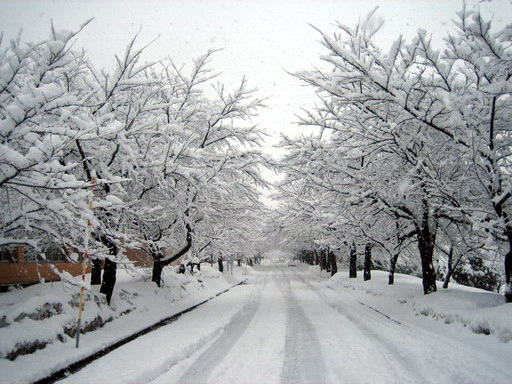 ฤดูหนาวในมหาวิทยาลัยเทคโนโลยีนะงะโอะกะ